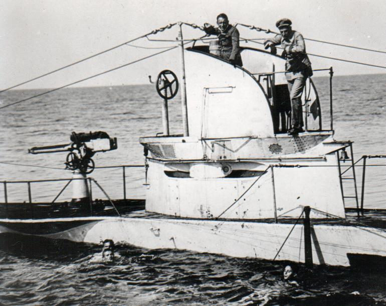 German UBoat U27 Sunk 19 August 1915